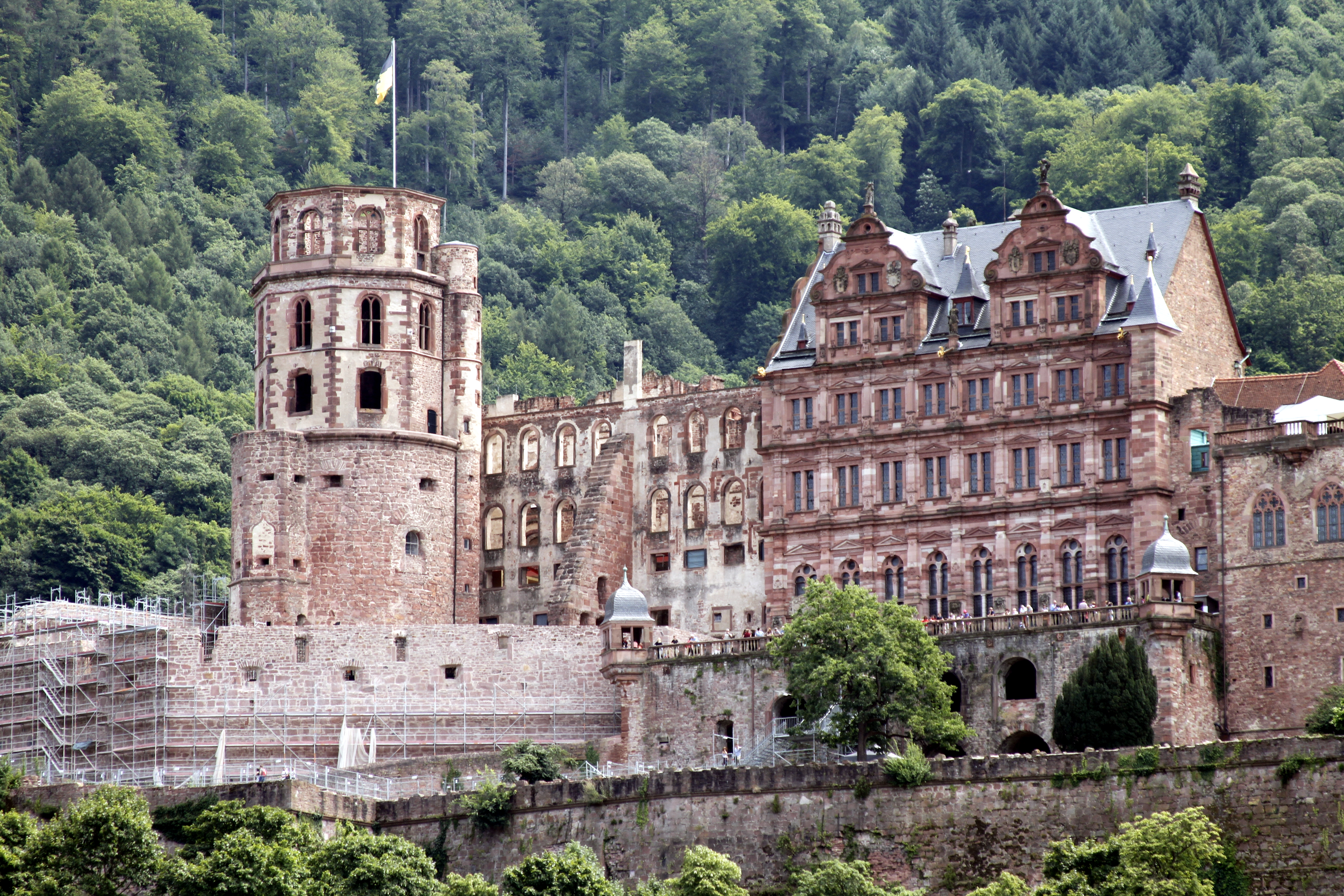 Heidelberg Castle seen from the Alte Brücke - Heidelberg - Germany